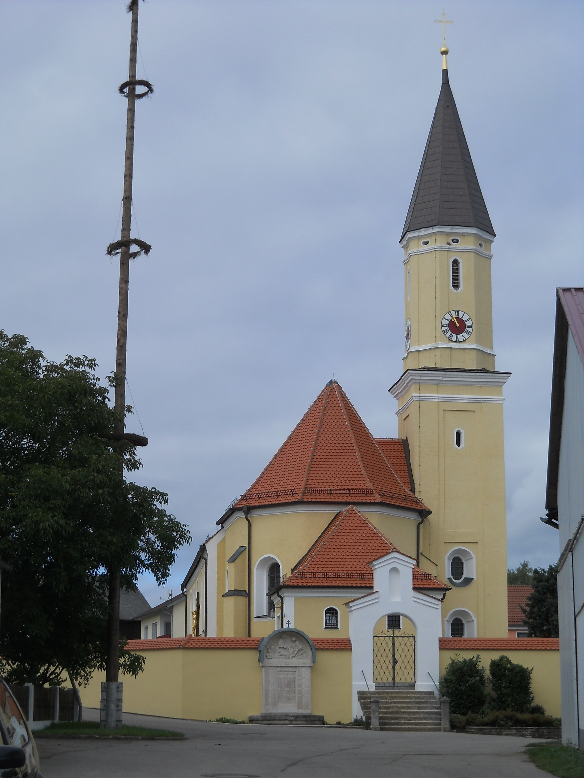 Pondorf (Markt Altmannstein im Landkreis Eichstätt), Kath. Kirche St. Peter und PaulThis is a photograph of an architectural monument.